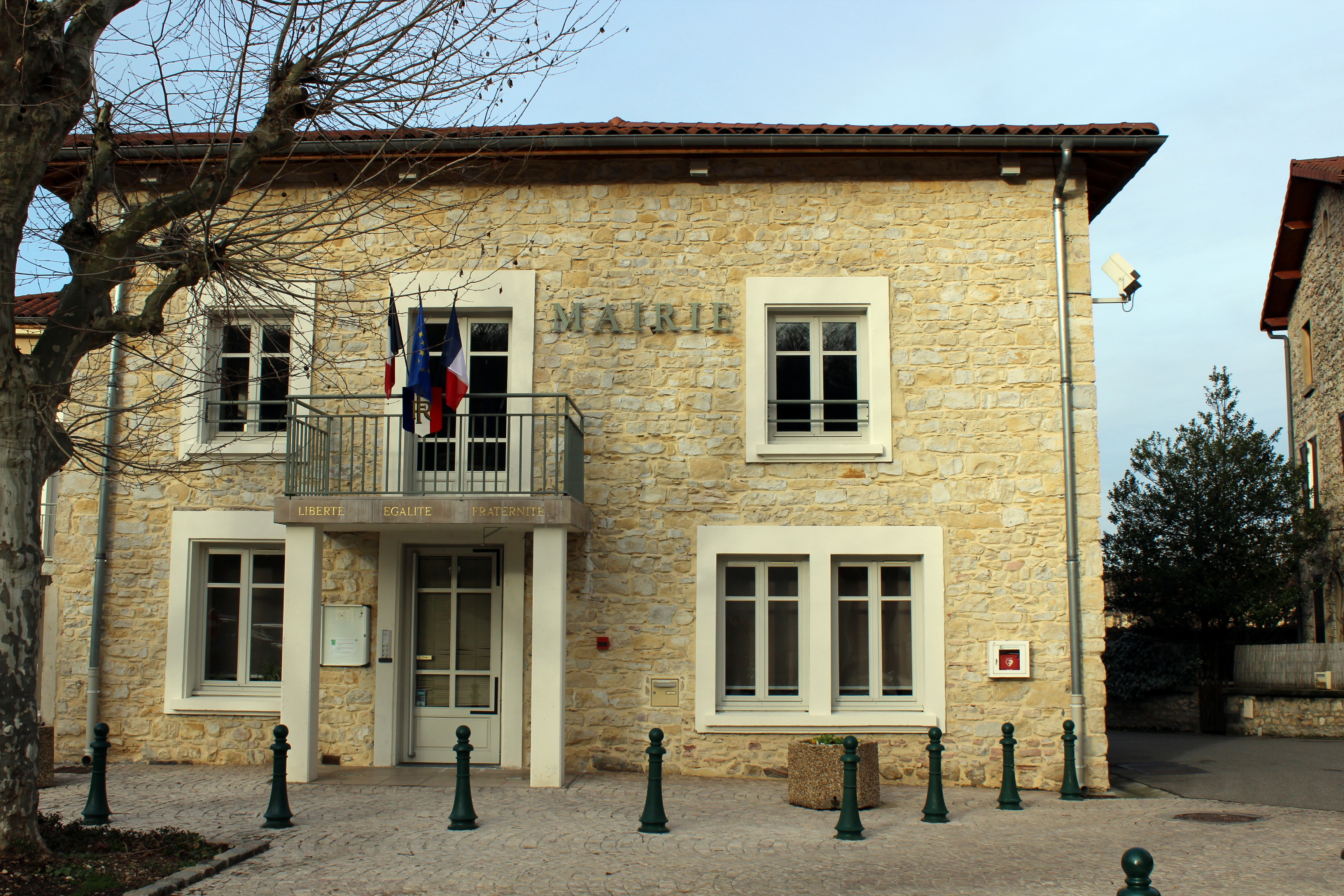 Mairie de Vaulx-Milieu.